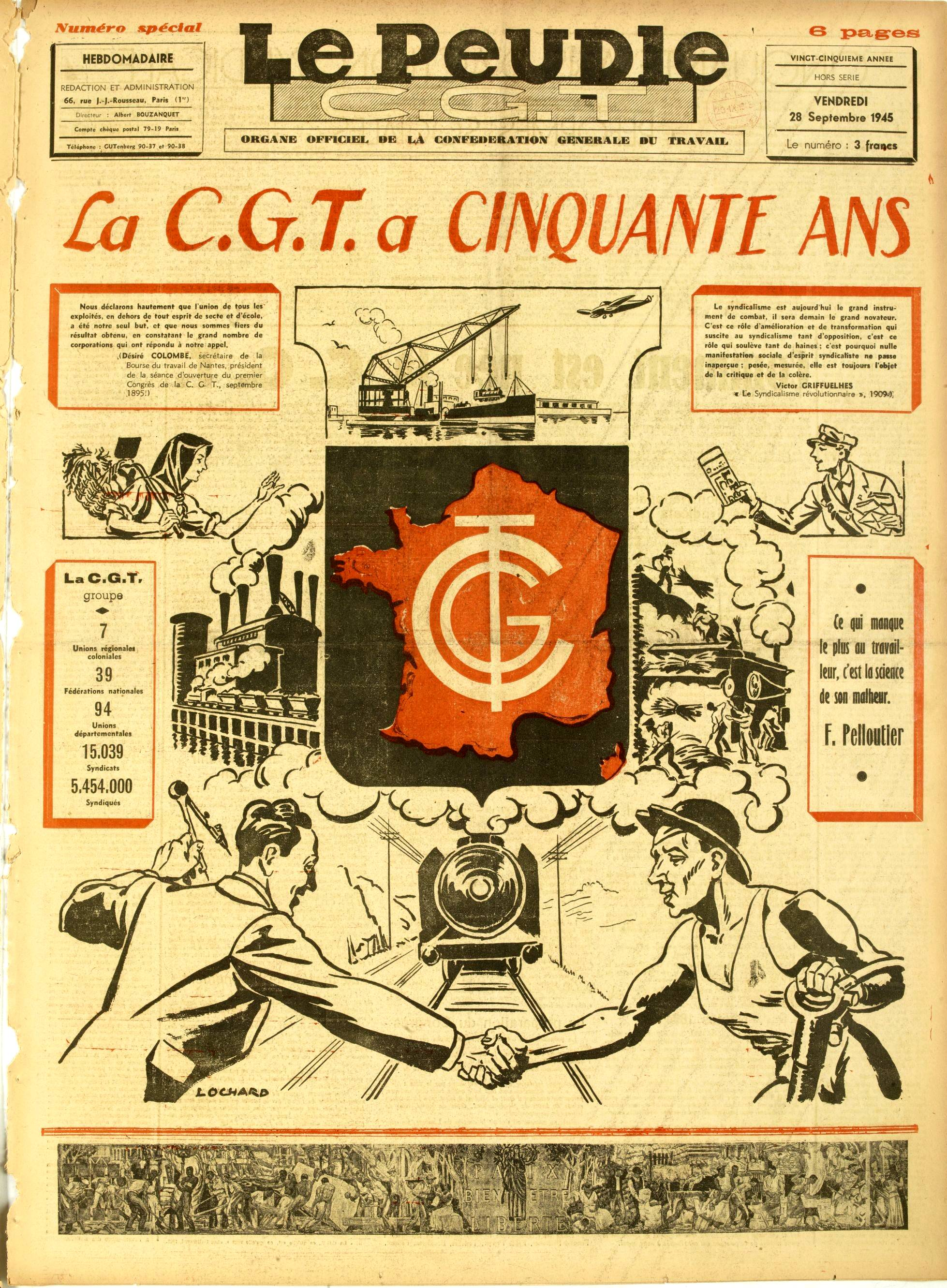 La une du journal "Le Peuple" organe officiel de la Confédération générale du travail (CGT), datée du 28 septembre 1945.